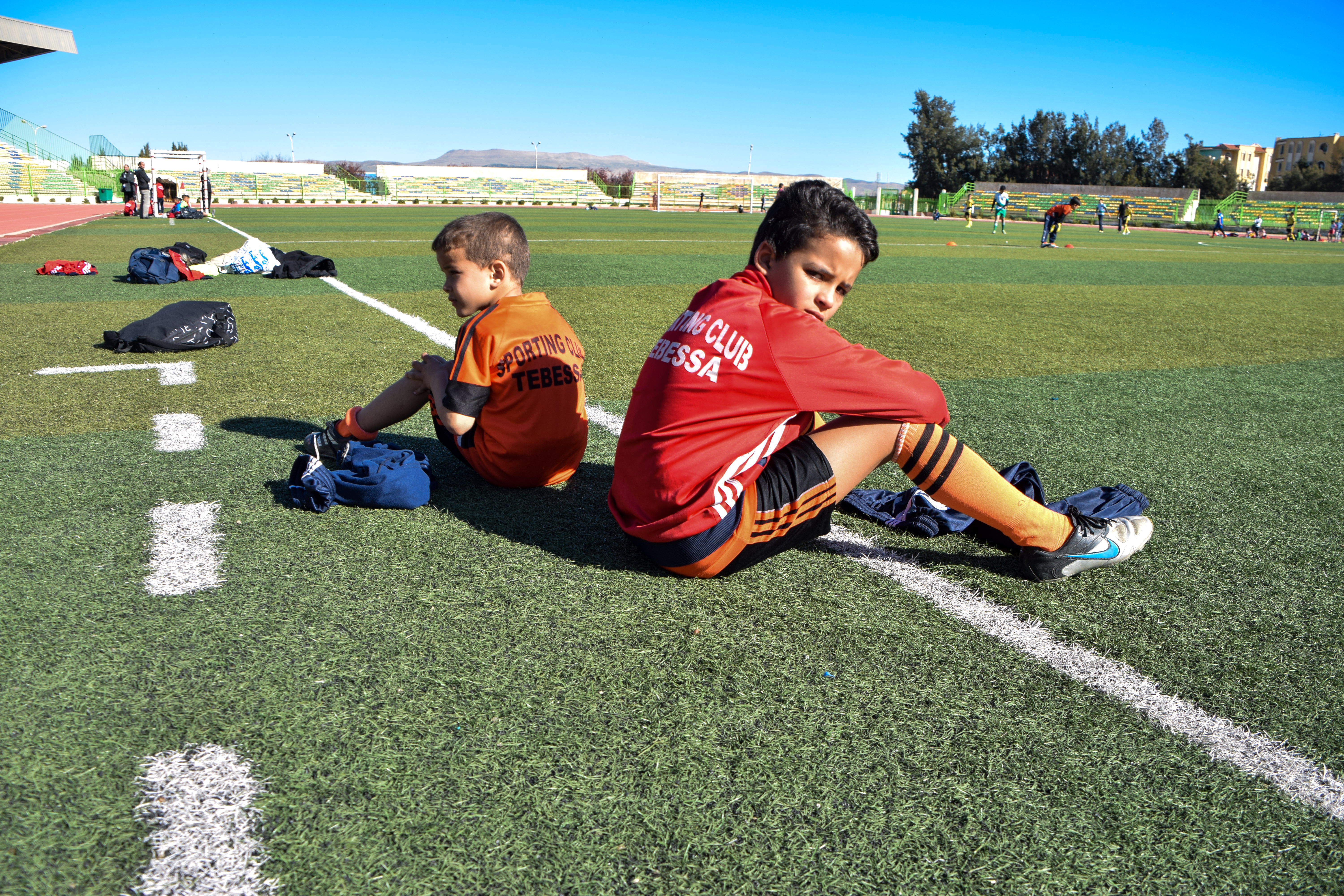 Jeunes sportifs au repos This is an image with the theme "Africa on the Move or Transport" from: Algeria